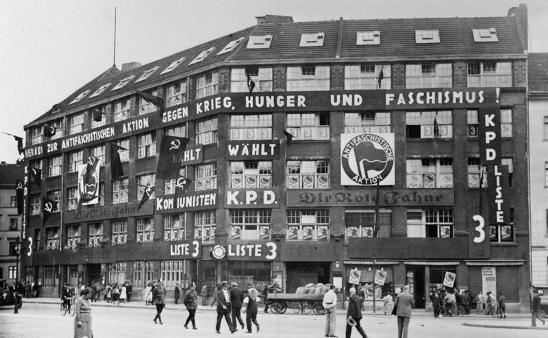 Karl Liebknechthaus in Berlin am Bülowplatz Das frühere Karl-Liebknecht-Haus in Berlin am Bülowplatz, war Sitz der KPD-Führung. Wir sehen es anlässlich einer Reichstagswahl im Propagandaschmuck.